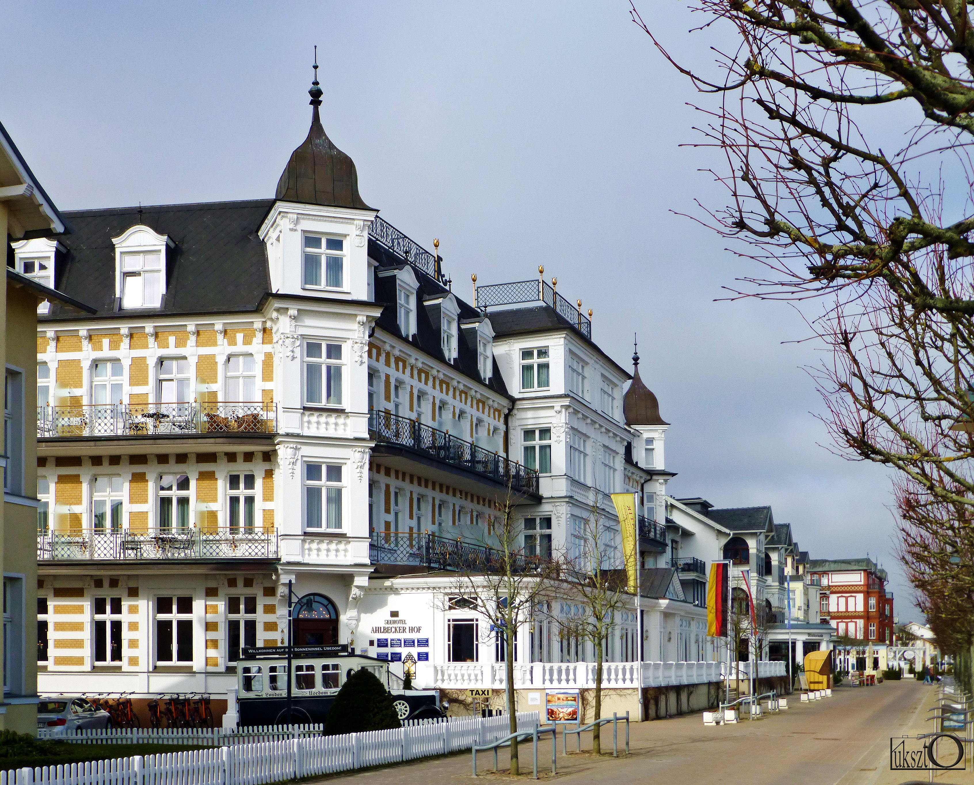 Heringsdorf, Niemcy , nadmorski kurort